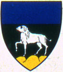 Wappen von Eisten VS